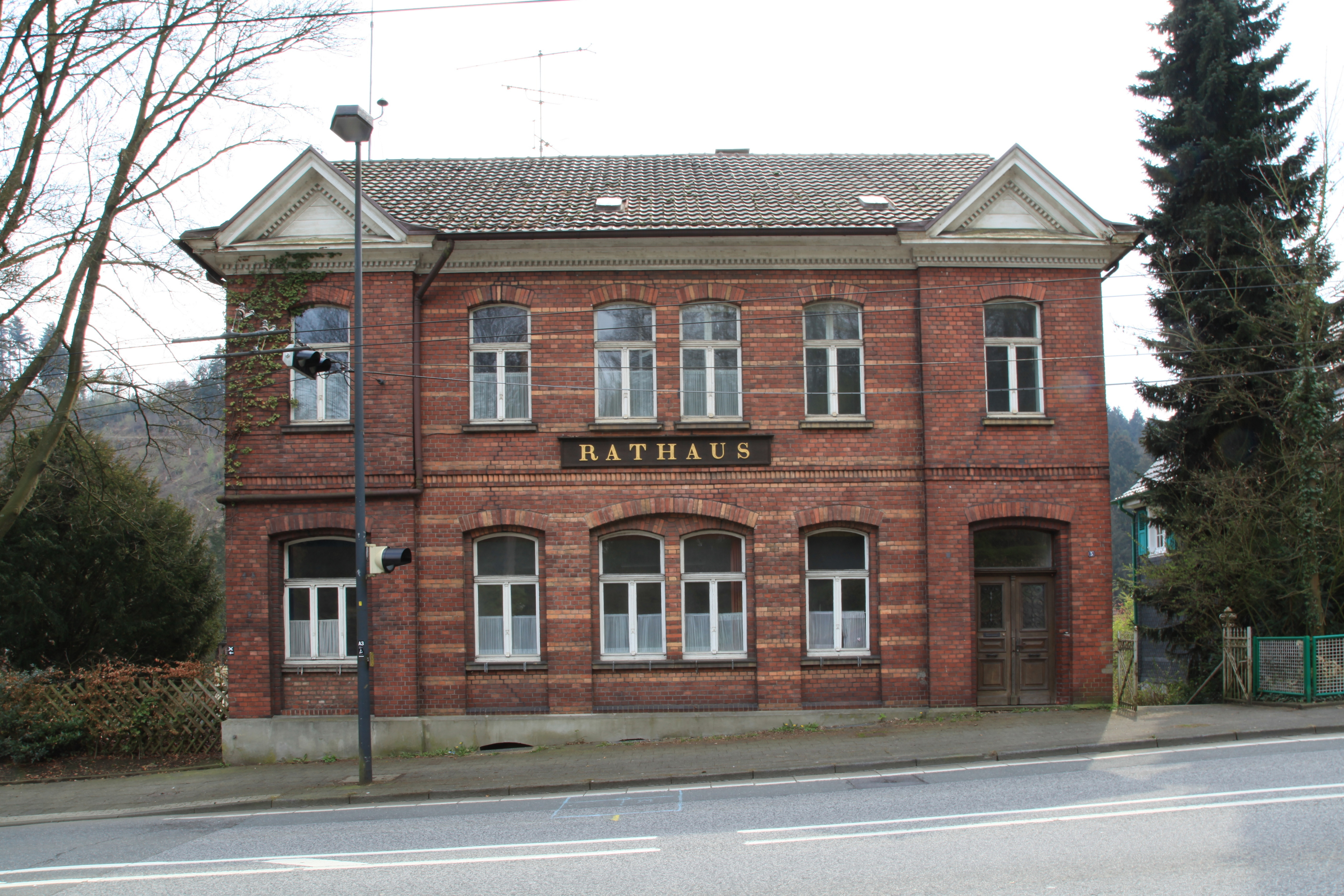 Ehemaliges Rathaus von Burg an der Wupper, Solinger Straße in Solingen-Burg